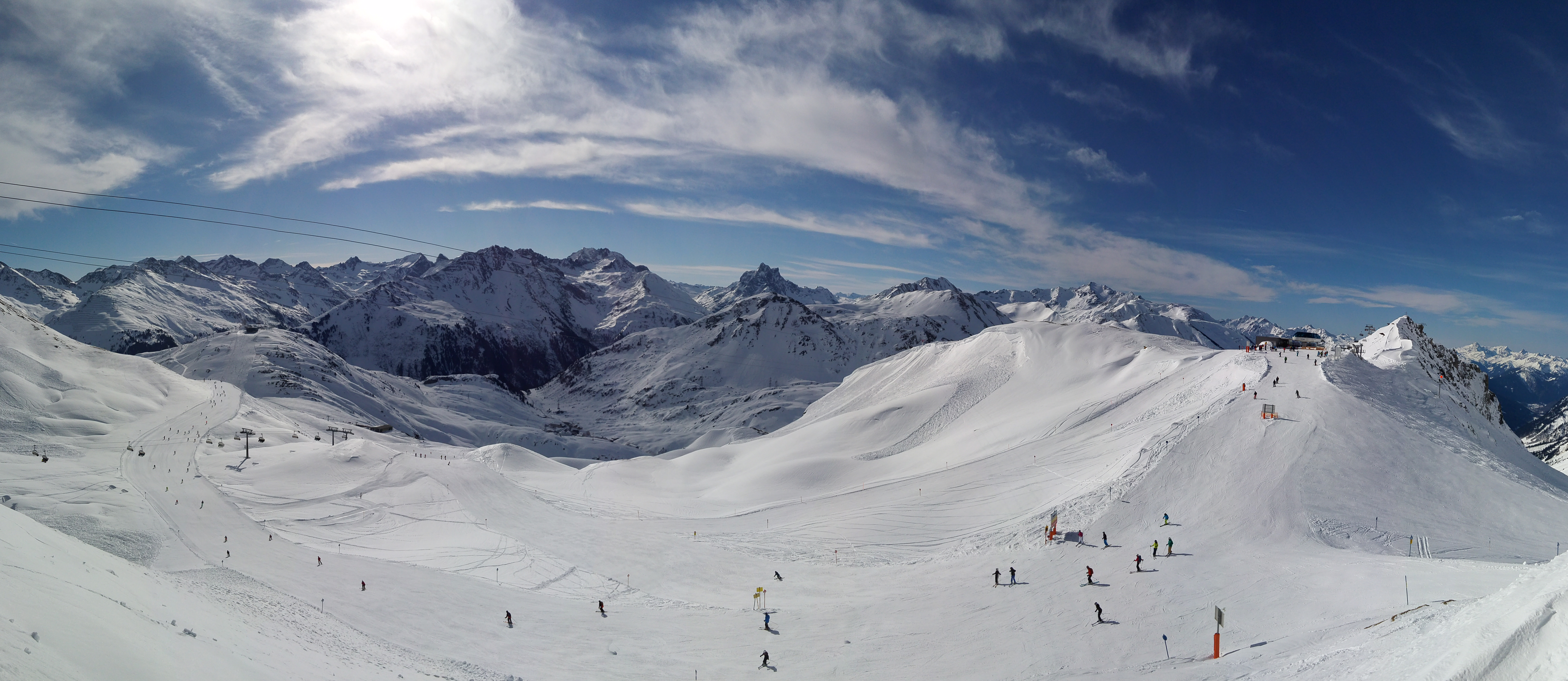 Ausblick von der Ulmer Hütte auf das Skigebiet St. Anton am Arlberg